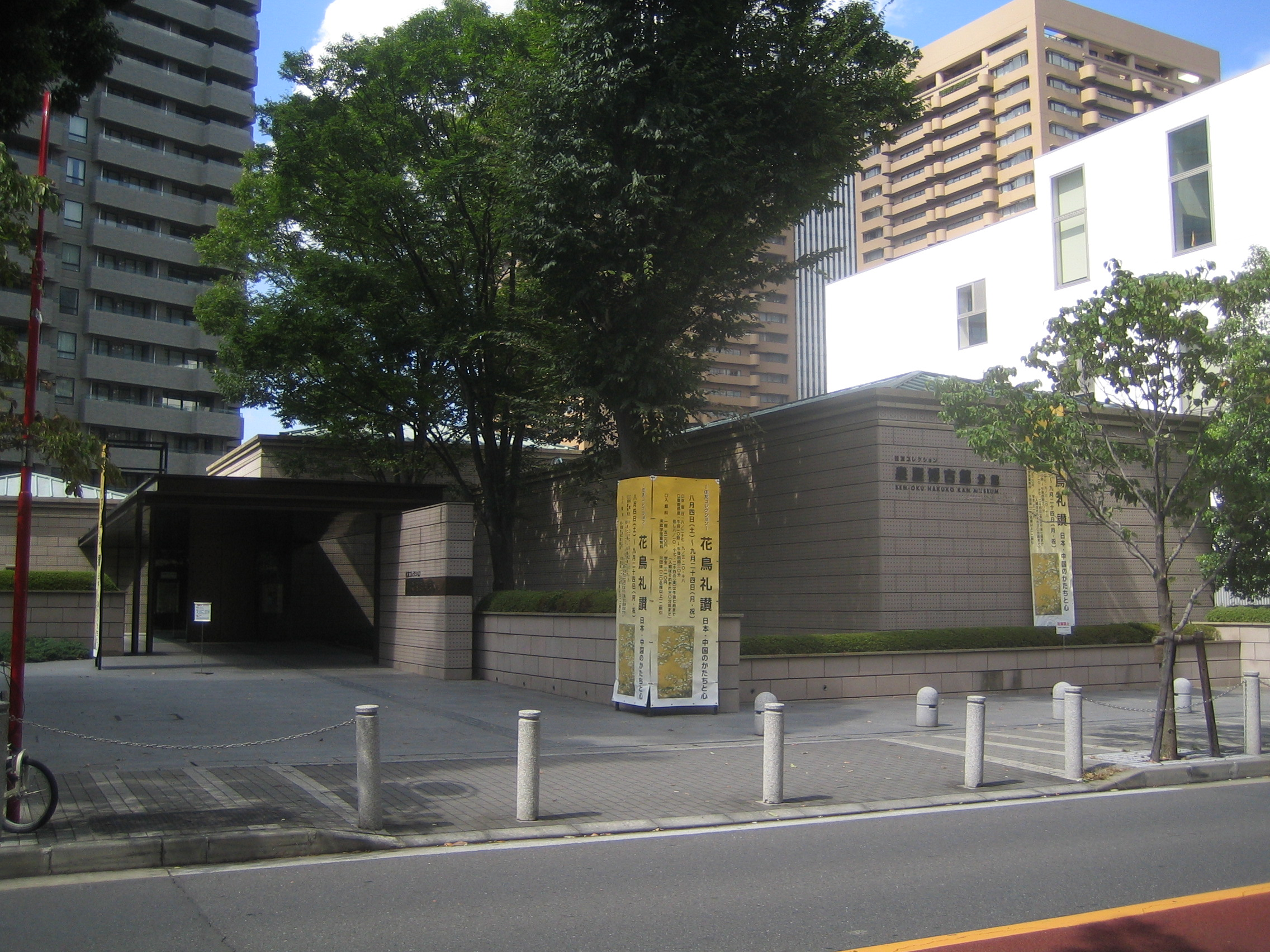 泉屋博古館。東京都港区六本木 Sen'oku Hakkokan (泉屋博古館), at Roppongi, Minato, Tokyo, Japan